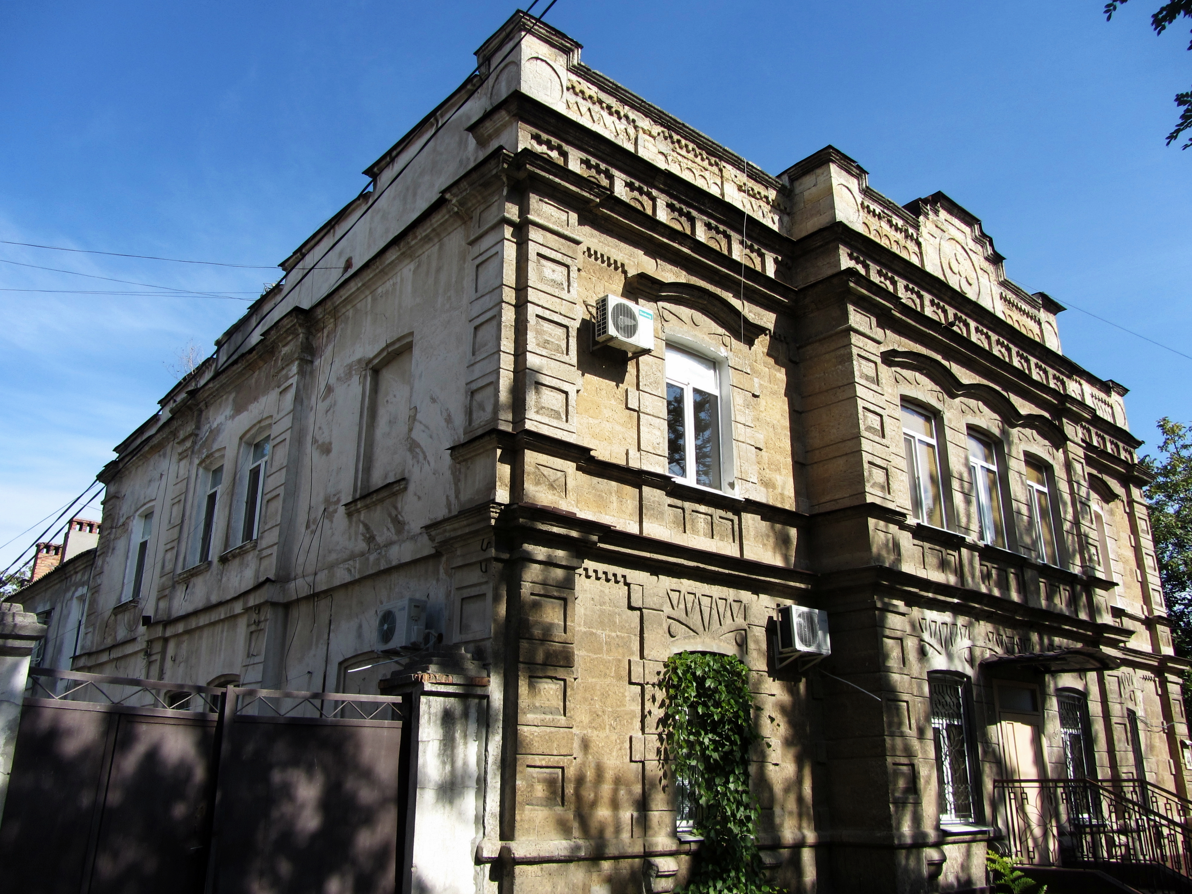 Житловий будинок прибуткового типу, Миколаїв, вул. Велика Морська, 48